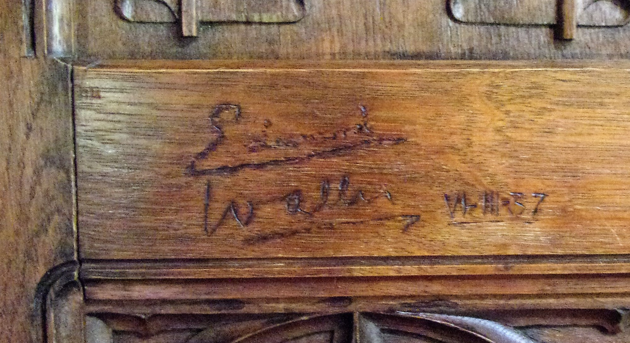 Signatures pyrogravée du duc et de la duchesse de Windsor sur une boiserie du château.